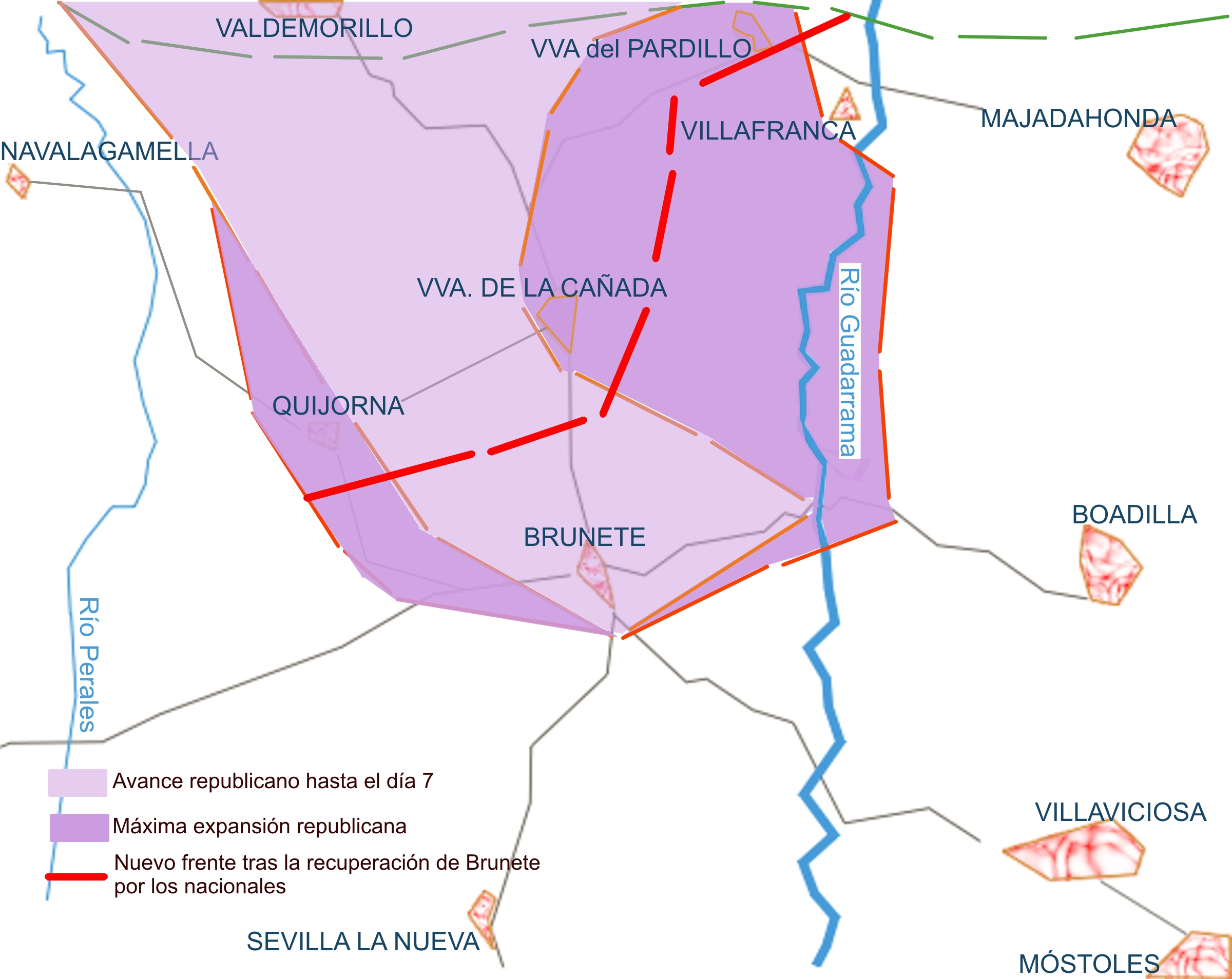 Movimiento del frente, batalla de Brunete